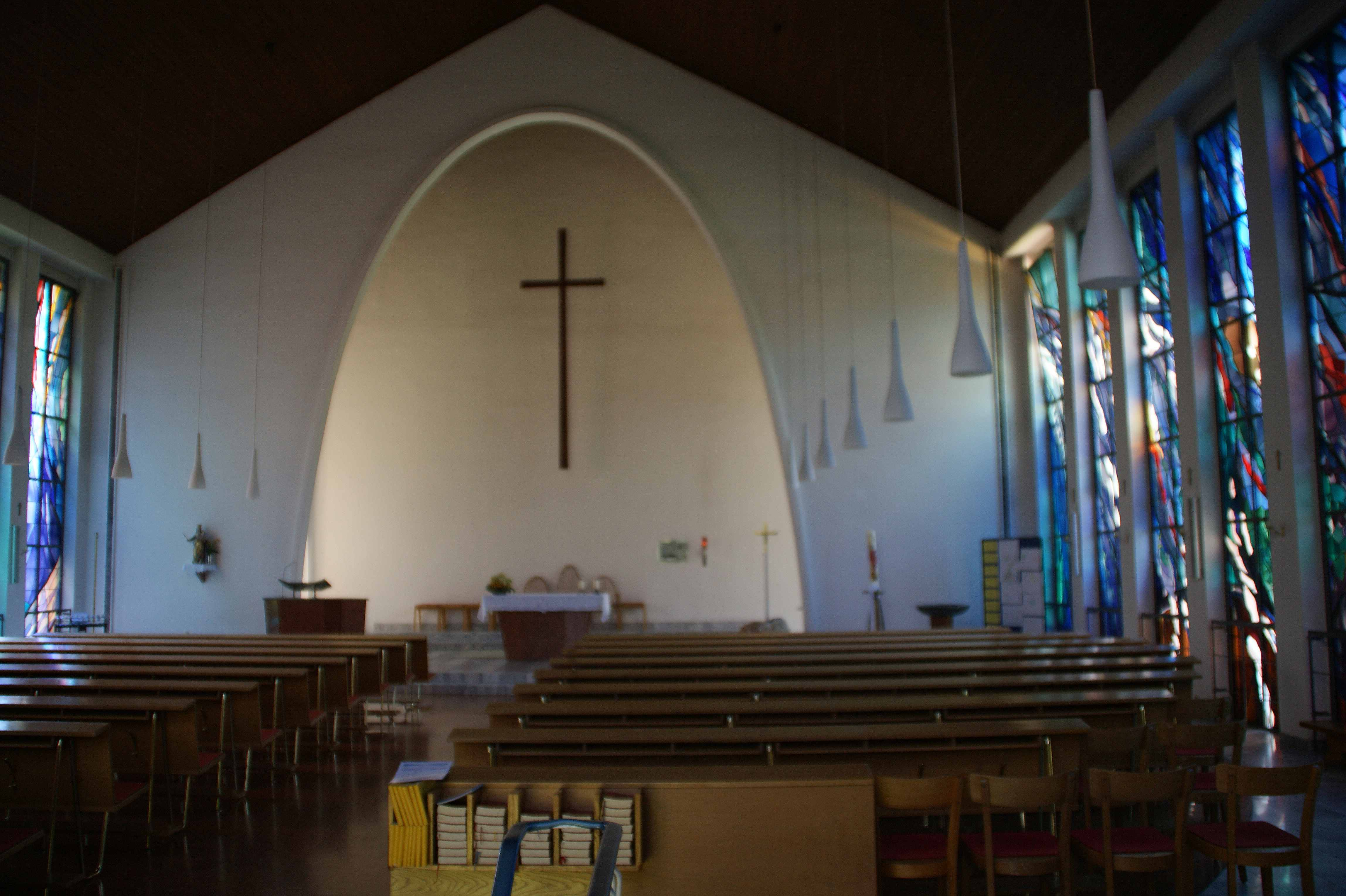 Kath. Pfarrkirche Zum gekreuzigten Erlöser in Hönigsberg, Kirchenraum